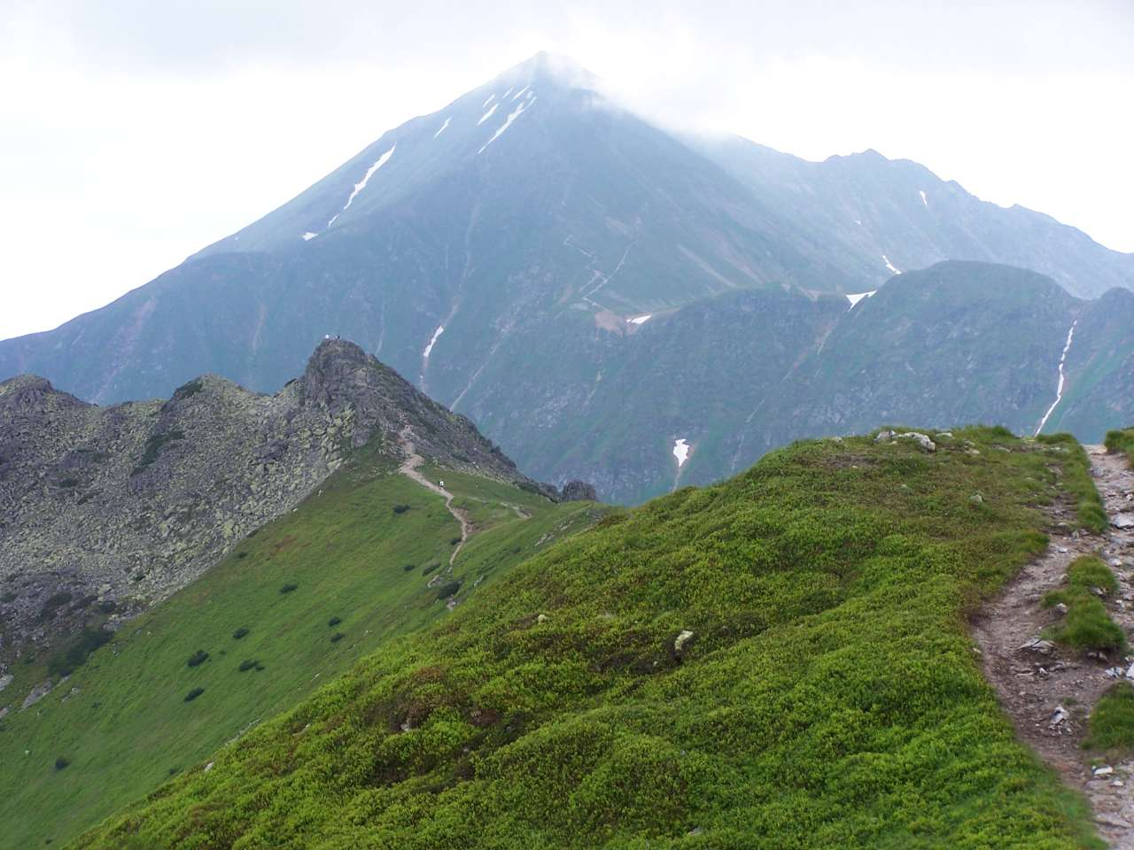 Błyszcz i Bystra -widok z Ornaku